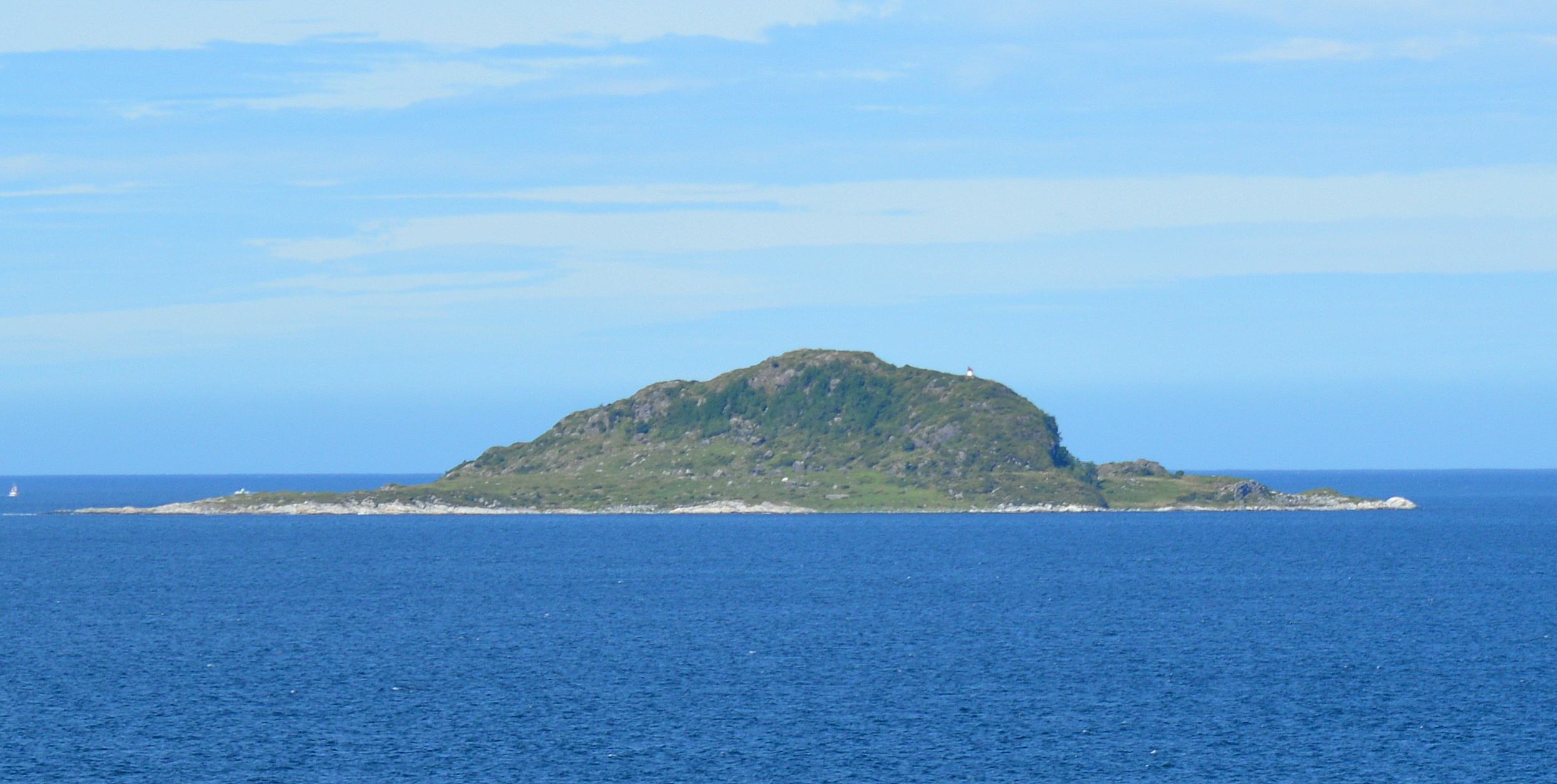 Havsteinen 2017 Blick von Alesund